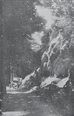 Мястото, където е отвлечена Елън Стоун.